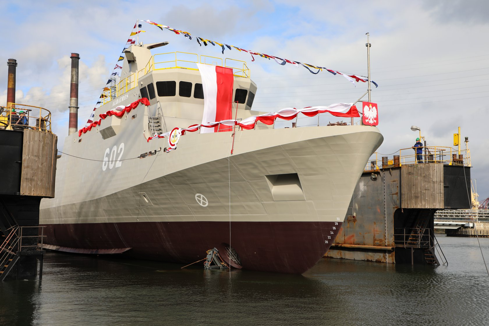 Nowy niszczyciel min polskiej Marynarki Wojennej ORP Albatros w stoczni, chwilę po swoim wodowaniu.